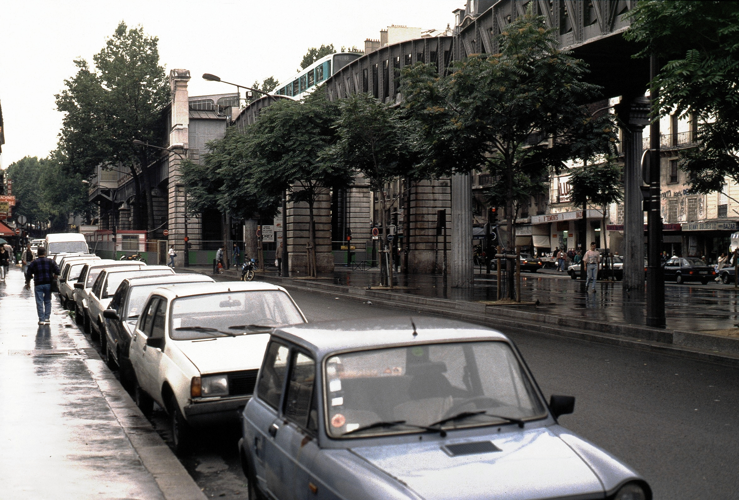 Metrostation Barbès – Rochechouart